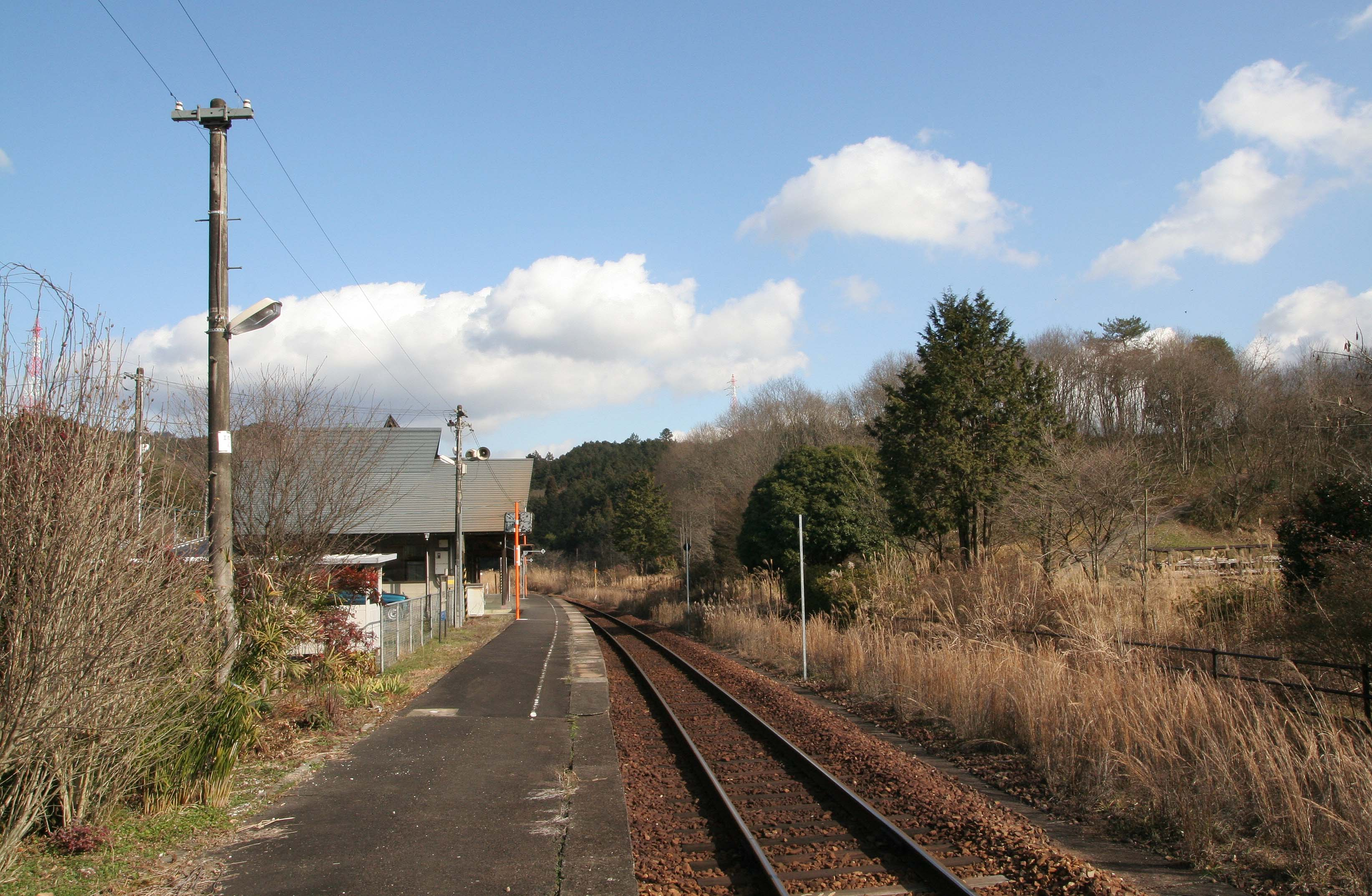 美作追分駅の構内